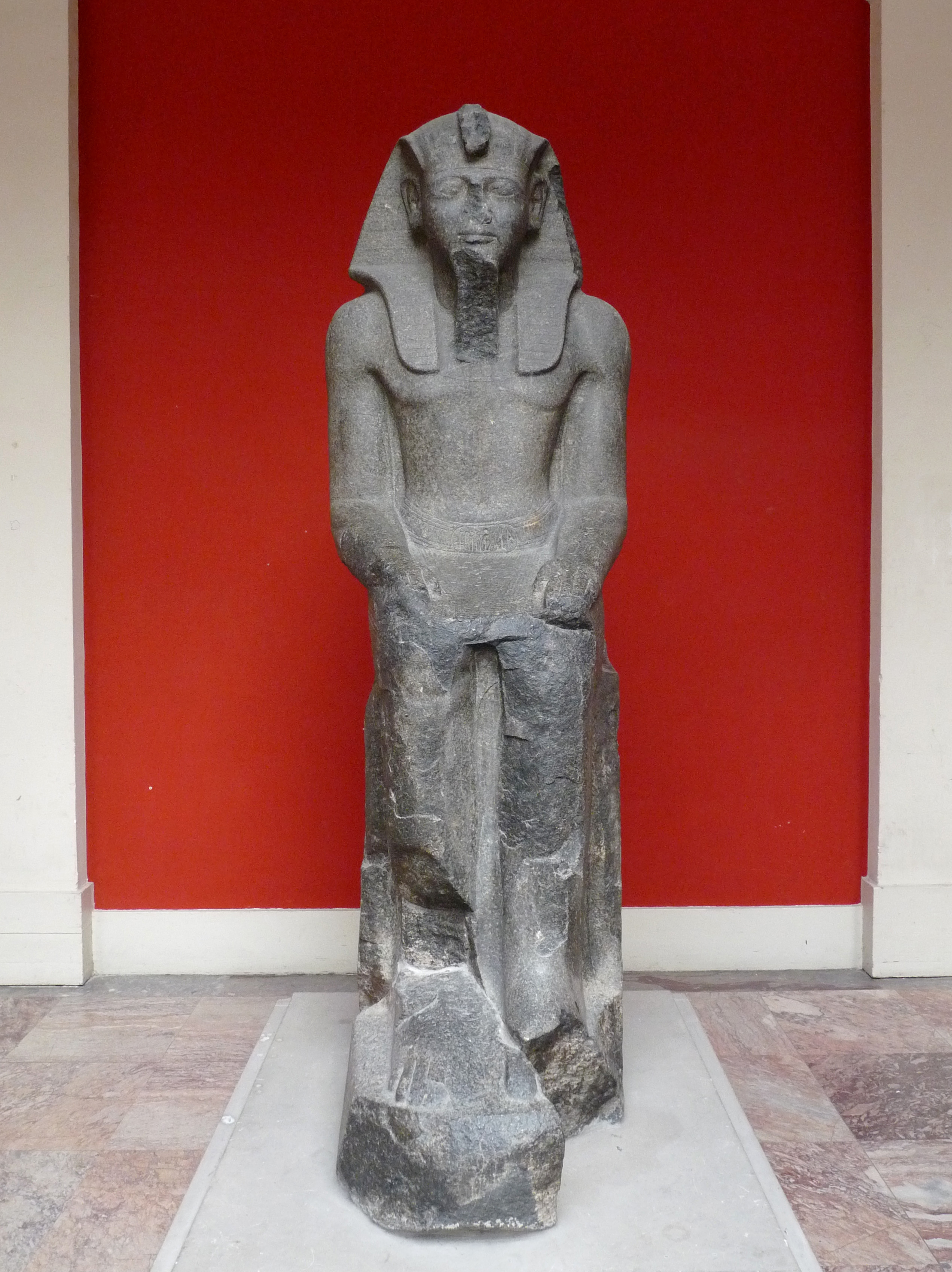 Grande statue assise de Ramsès II, dans l'aula du Palais Universitaire de Strasbourg. Granit noir, 2,15 m. Exhumée par la Mission Montet le 18 mars 1933 à l'emplacement du vestibule du "Temple d'Anta" (en fait un temple de Mout et Khonsou l'Enfant)